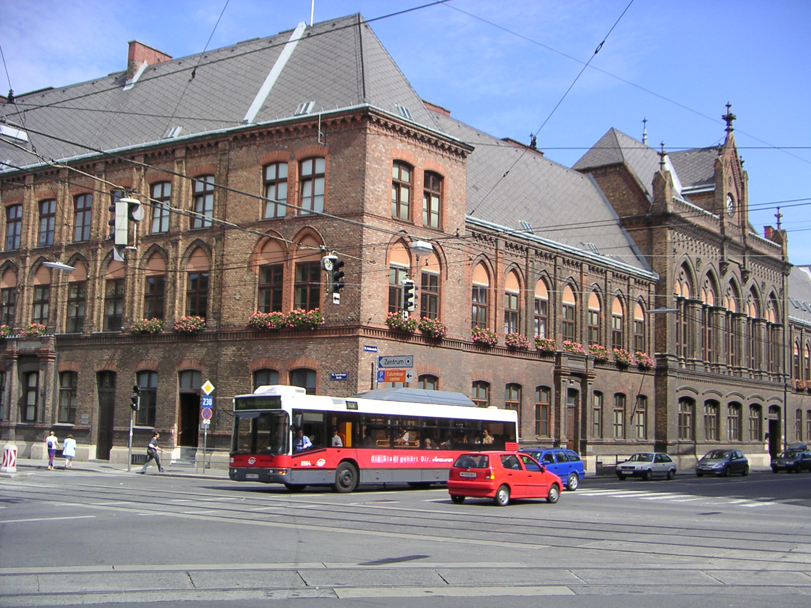 Magistratisches Bezirksamt in Wien Favoriten an der Laxenburger Straße, selbst fotografiert